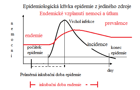 rozdíl mezi incidencí a prevalencí